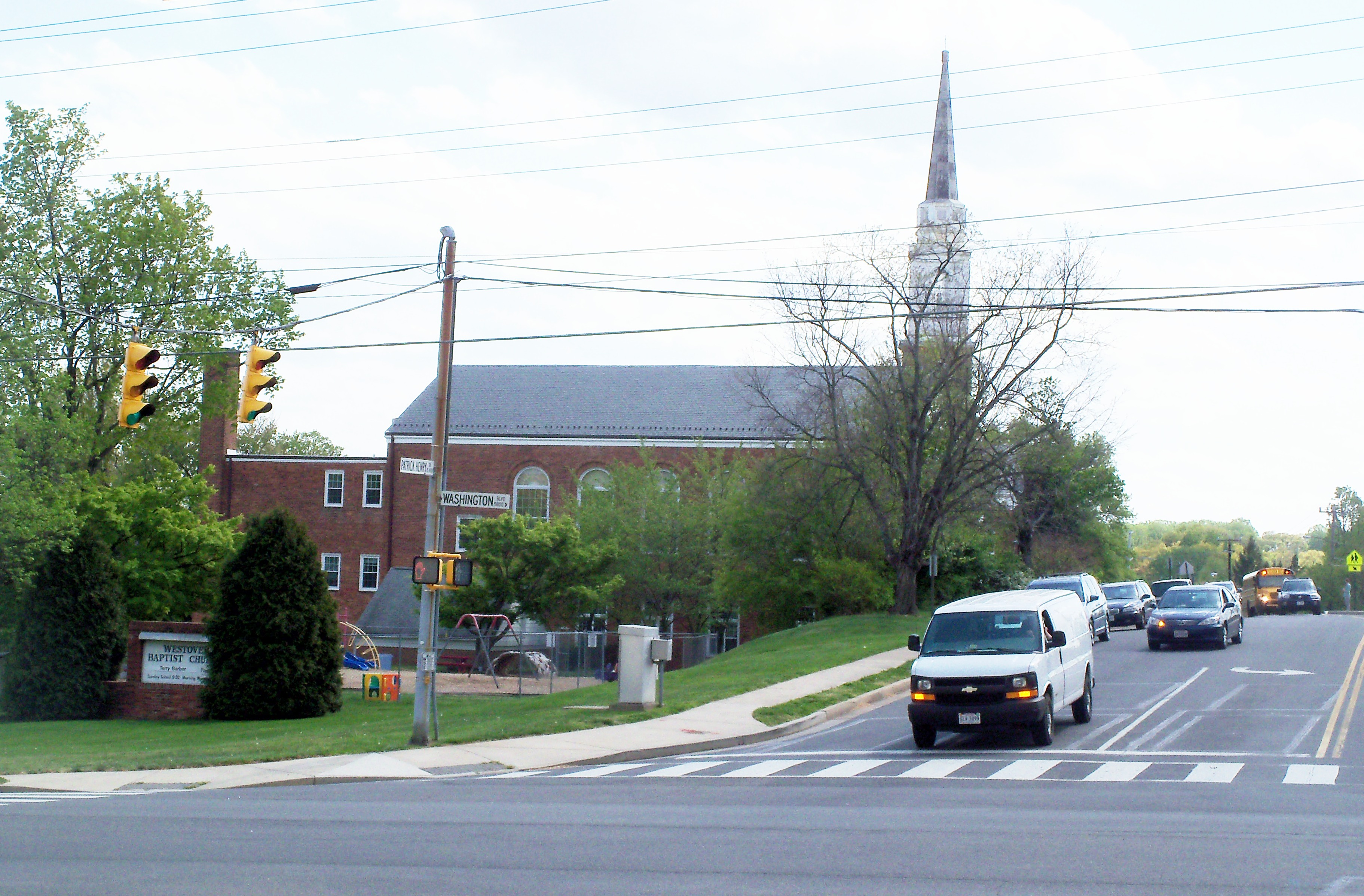 Westover Baptist Church